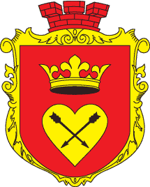 Герб Глинська